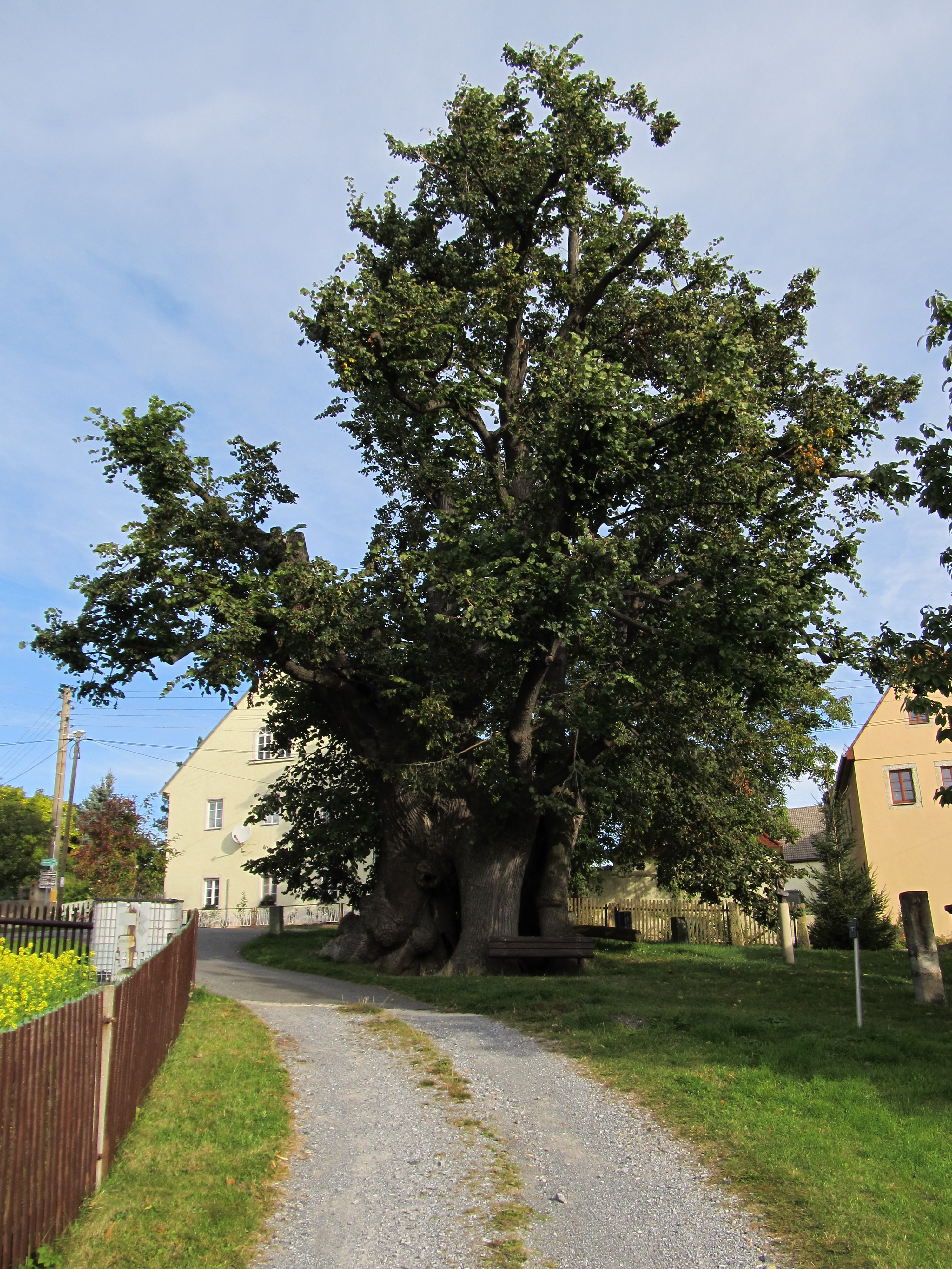 Schmorsdorfer Linde, Gesamtansicht